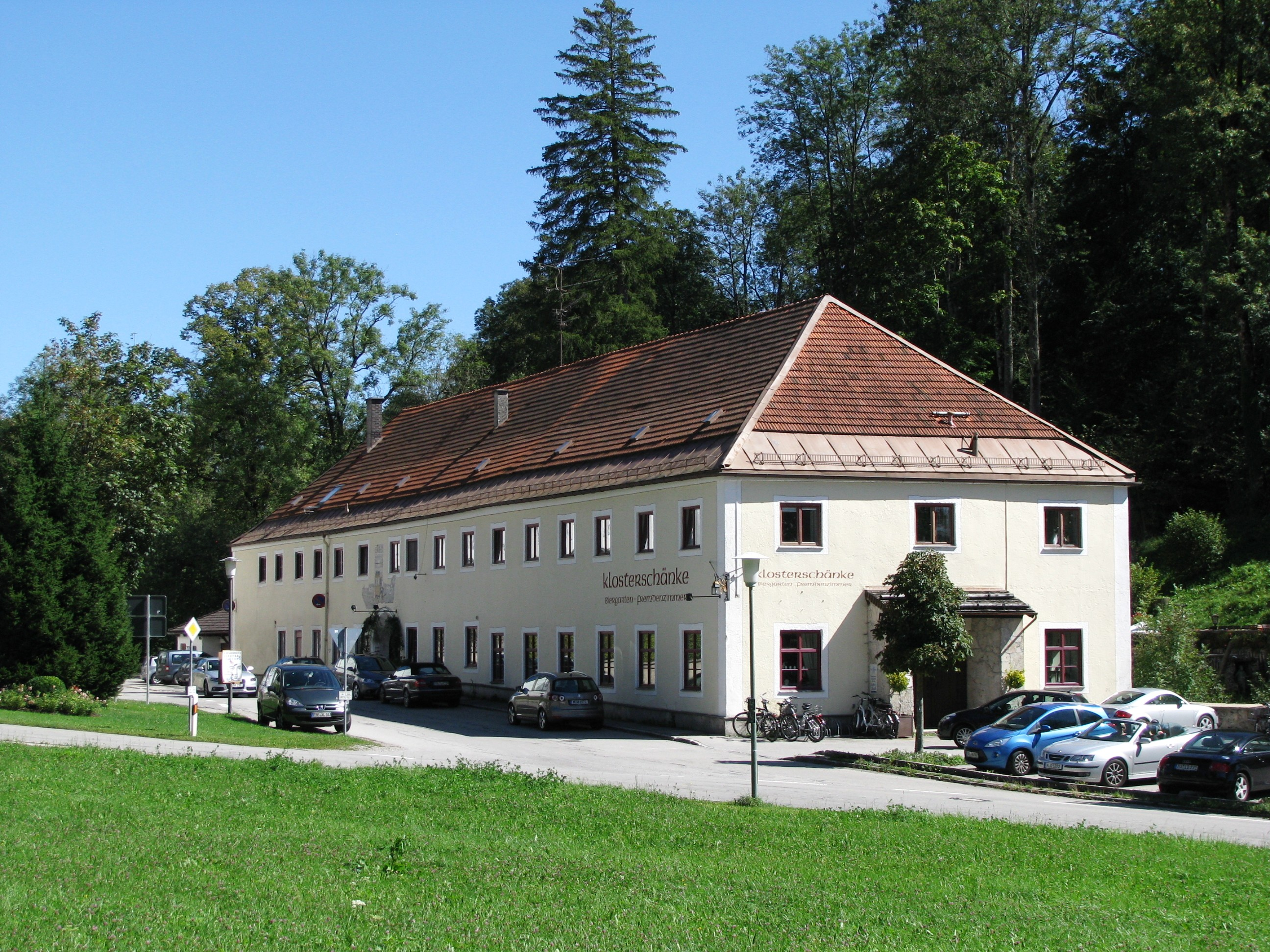 Klosterschänke in Dietramszell